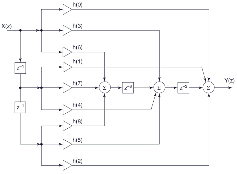 FIR Filterstruktur, Polyphasenstruktur